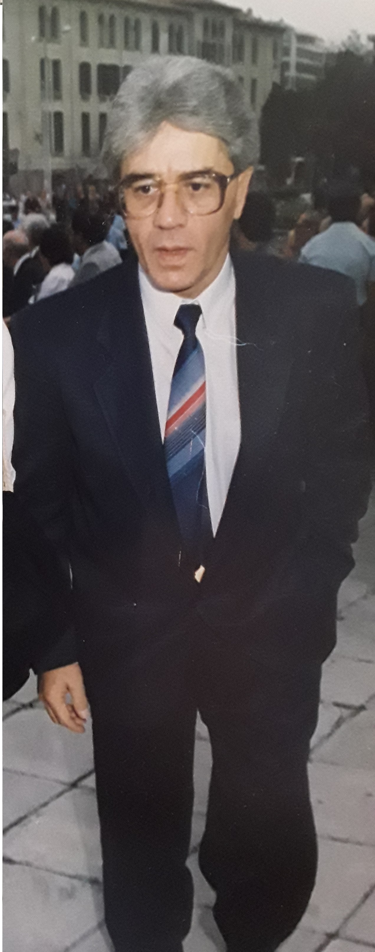 Ο Θεοχάρης Παπαμάργαρης προσερχόμενος στη Διεθνή Έκθεση Θεσσαλονίκης (Σεπτέμβριος 1989).